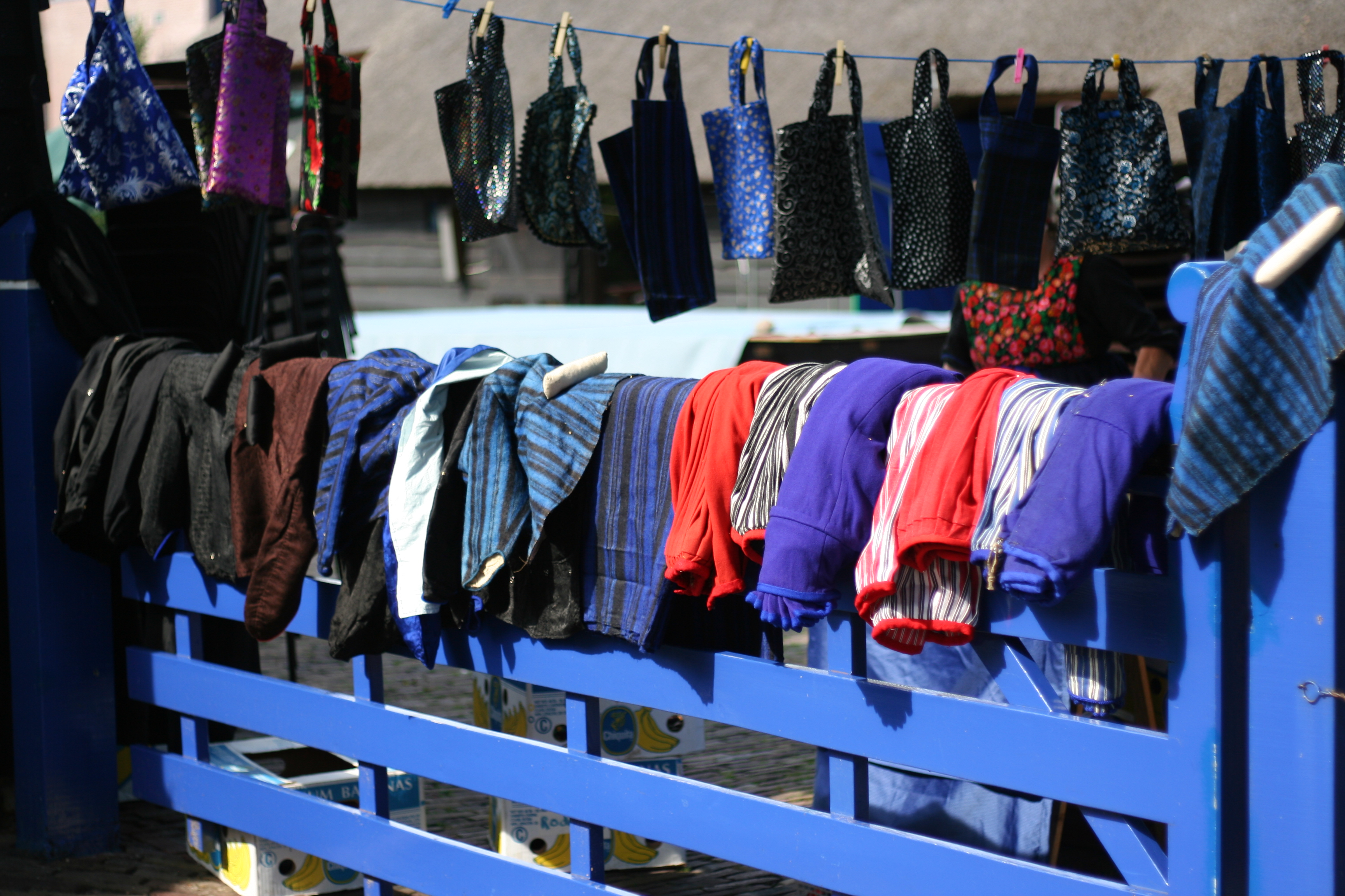 Staphorster klederdracht